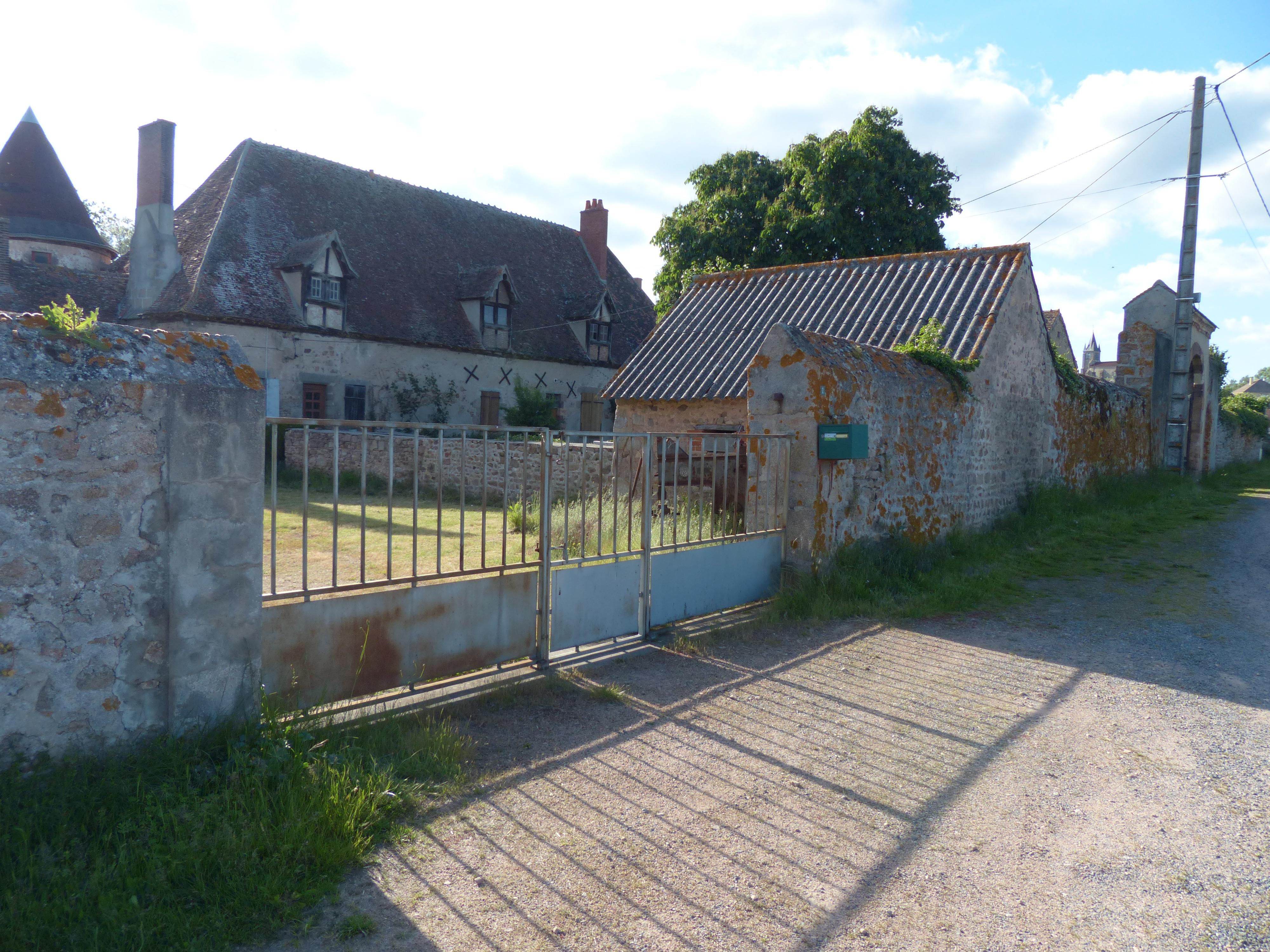 Château de Quinssaines, Allier (France). Façade est sur cour.